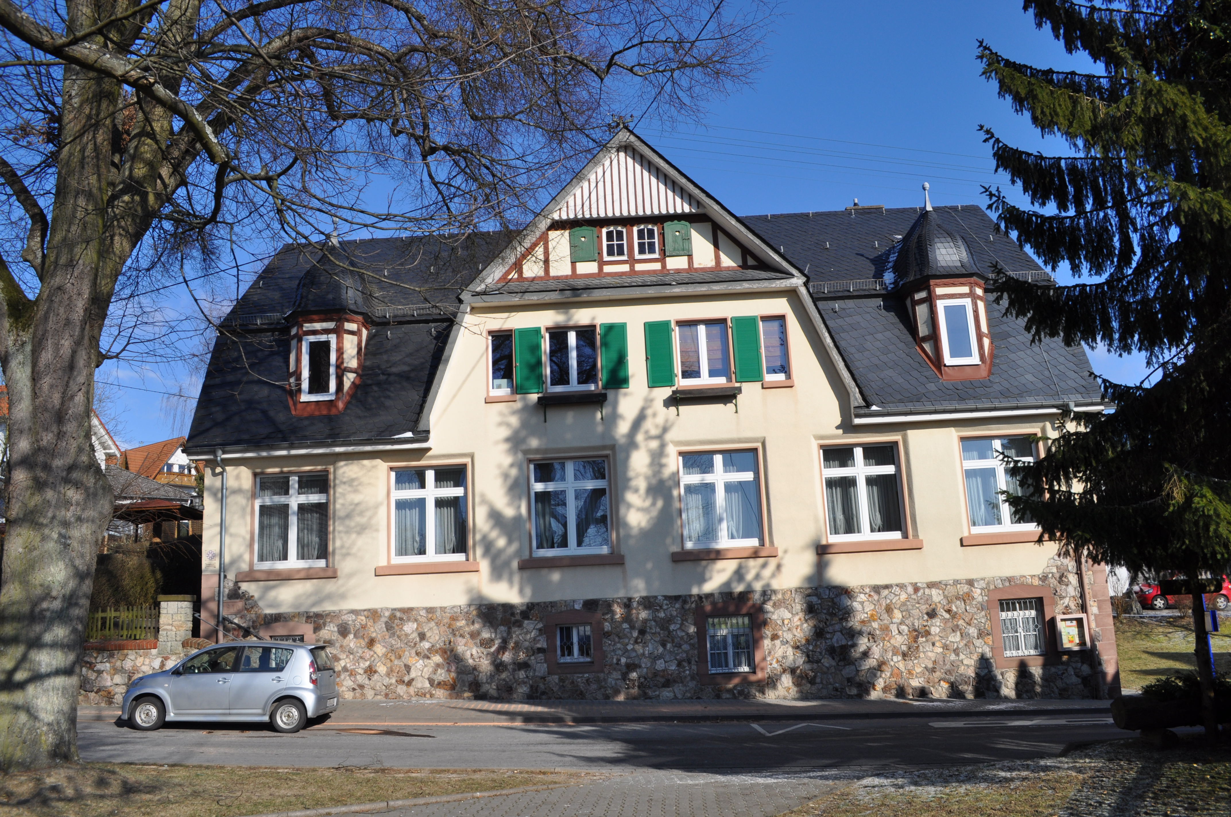 Alte Volksschule, Camberger Straße 12 in Steinfischbach